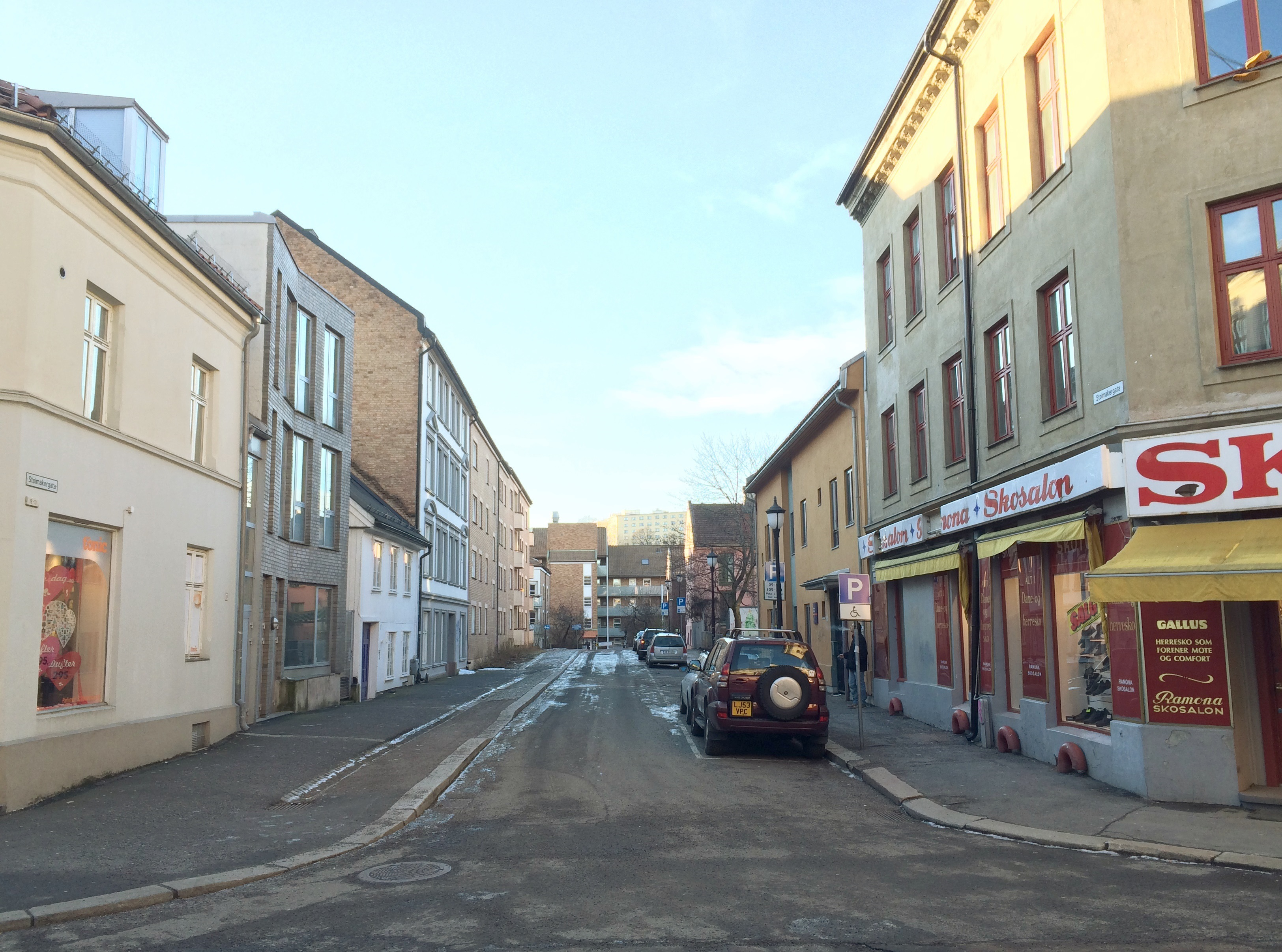 Stolmakergata sett fra Markveien